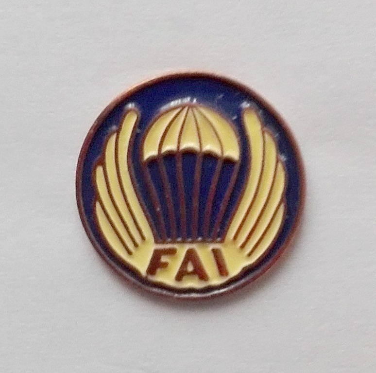 Brązowa Odznaka Skoczka Spadochronowego FAI